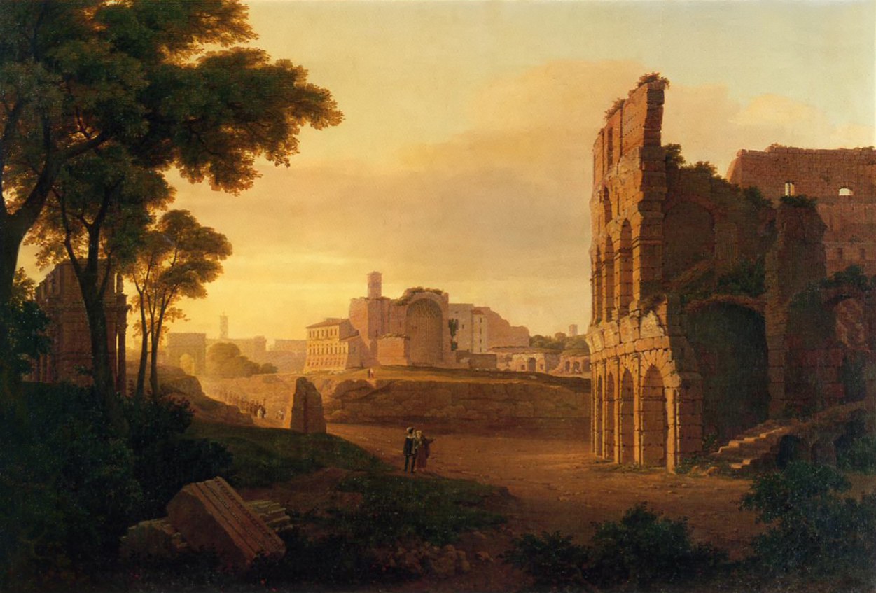 Rom, Kolosseum und das Forum Romanum mit der Kirche St. Francesca Romana und dem Tiberiusbogen. Links unter den Bäumen steht der Konstantinbogen.